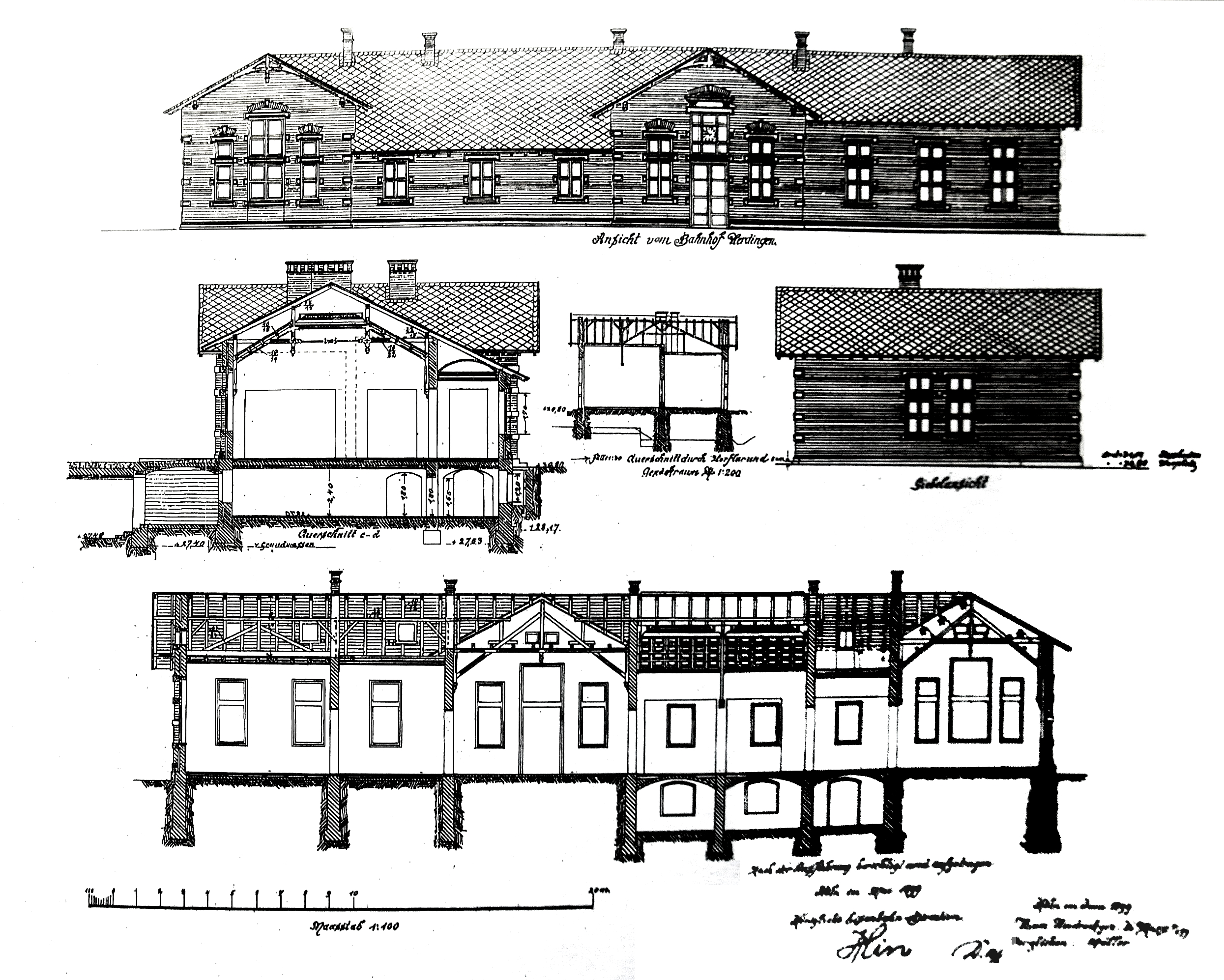 Foto des alten Bauplanes des Uerdinger Bahnhofs von 1899 (öffentliches Foto aus einer Schautafel in der Bahnhofsunterführung)